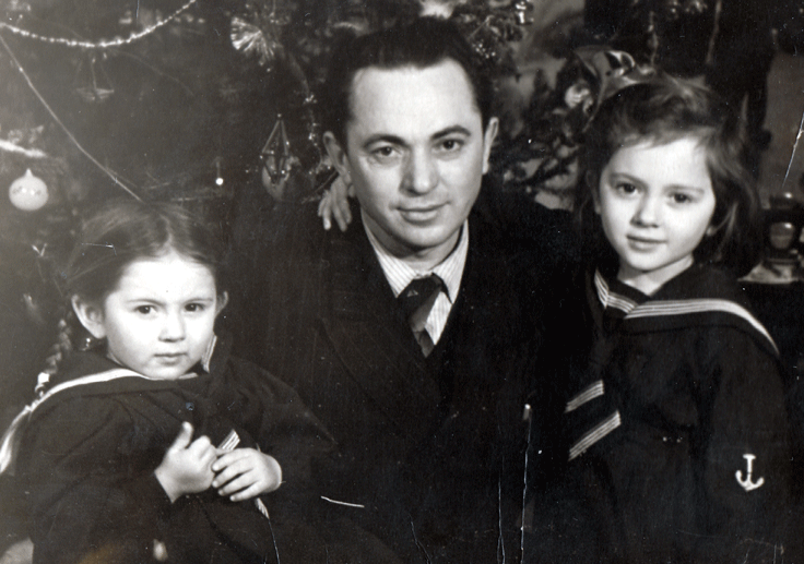 Иван Павлович Кузнецов со своими дочерьми